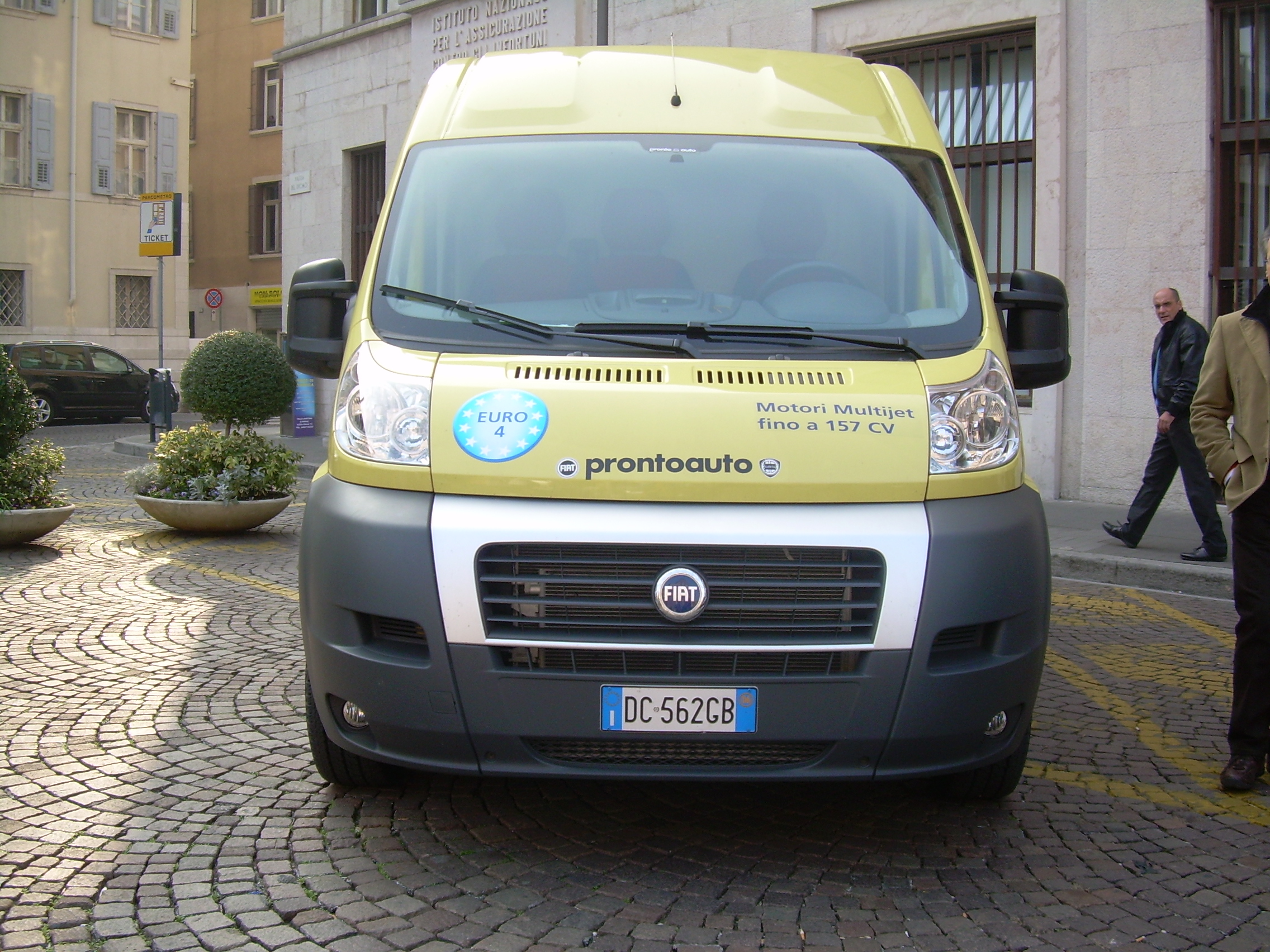 Fiat Ducato 3